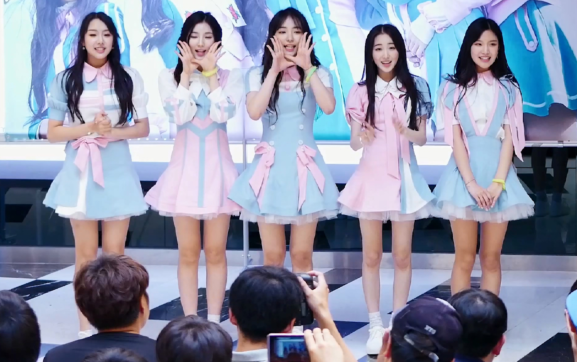 170624 엘리스 여의도 IFC 팬사인회 - 엘리스 '우리 처음' 4K 직캠 by DaftTaengk 4m26s